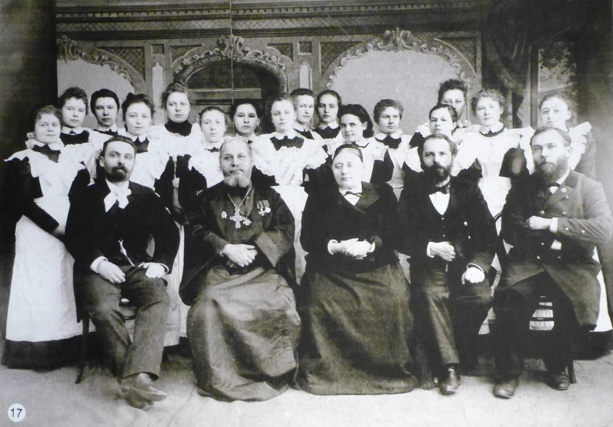 Выпуск Мариинской женской гимназии Петрозаводска.XIX век.(источник - Национальный музей Республики Карелия)